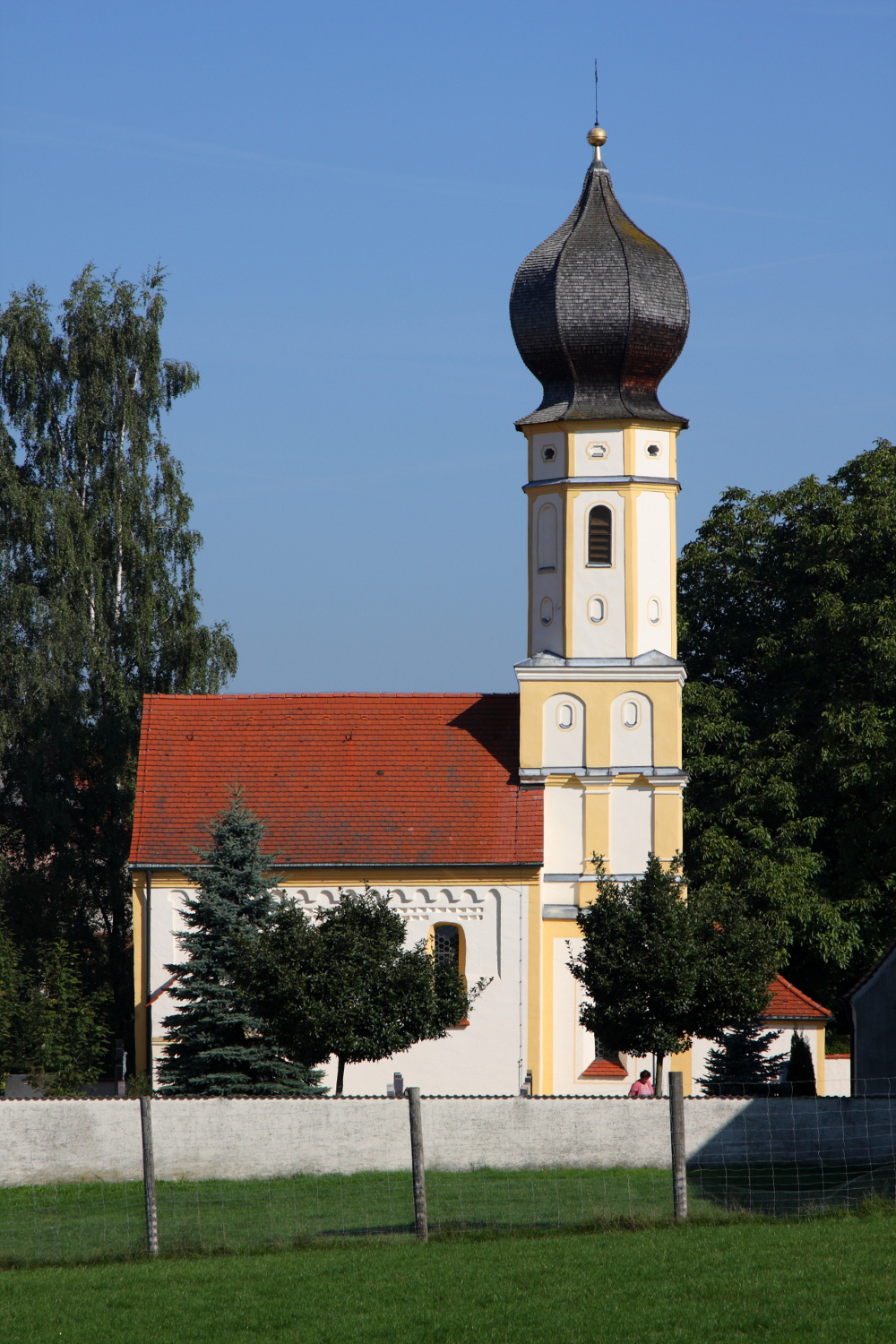 im Kern romanisch, im 17. Jh. umgestaltet; mit Ausstattung.This is a photograph of an architectural monument.